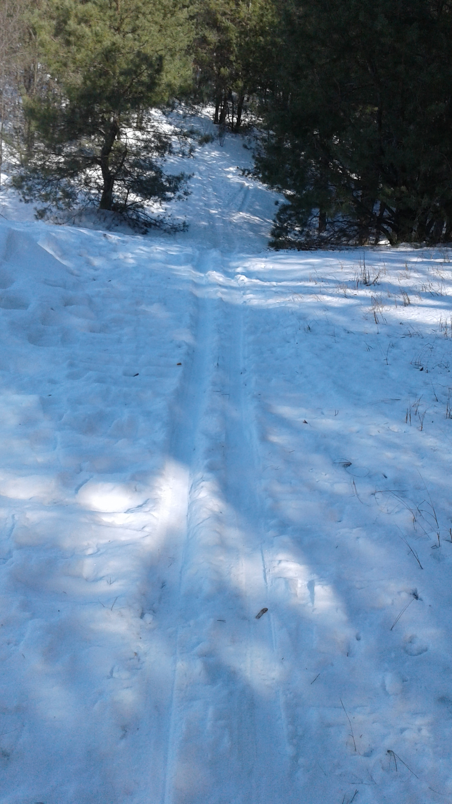 Південний сосновий ліс